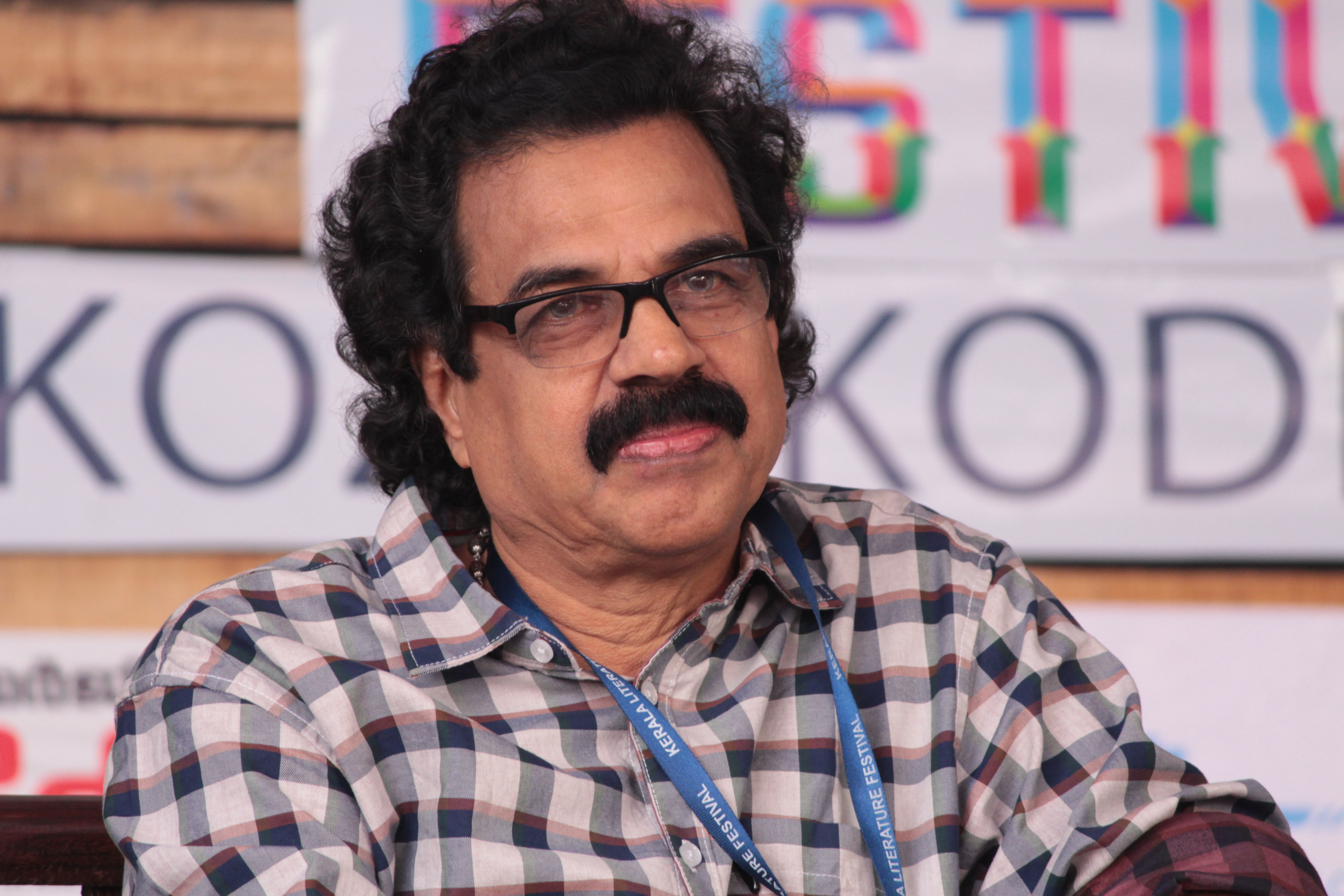 2017ലെ കേരളാ ലിറ്ററേച്ചര്‍ ഫെസ്റ്റിവല്‍ വേദിയില്‍